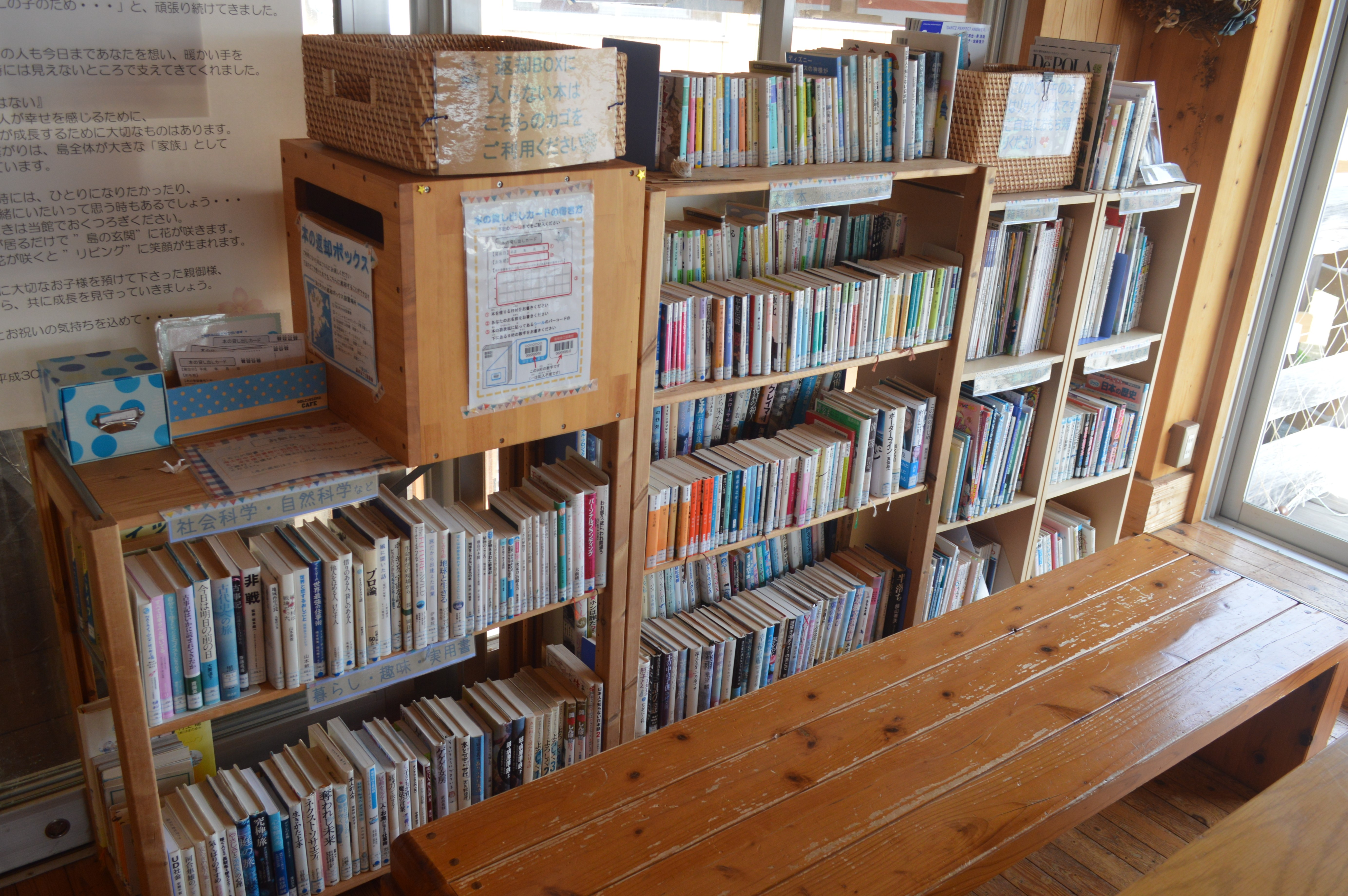 島根県隠岐郡海士町にある承久海道キンニャモニャセンター。海士町中央図書館キンニャモニャセンター図書分館。